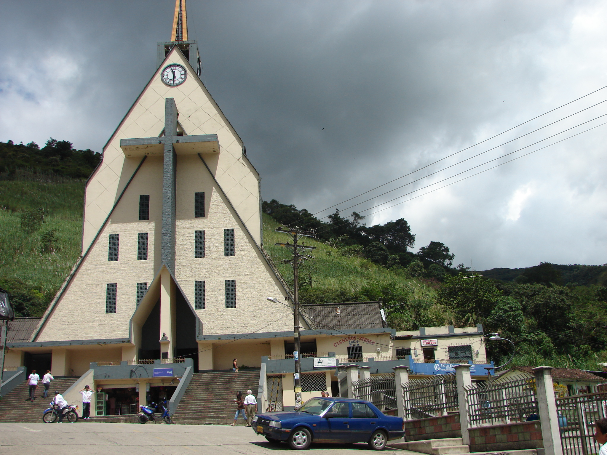 Iglesia del Municipio de Cisneros, Antioquia, Colombia.CISNEROS - ANTIOQUIA